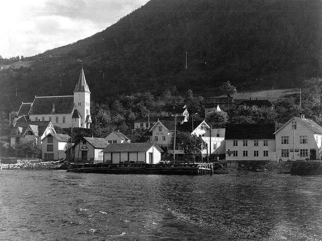 Utne sett frå fjorden like etter at båten/ferja har lagt frå kai